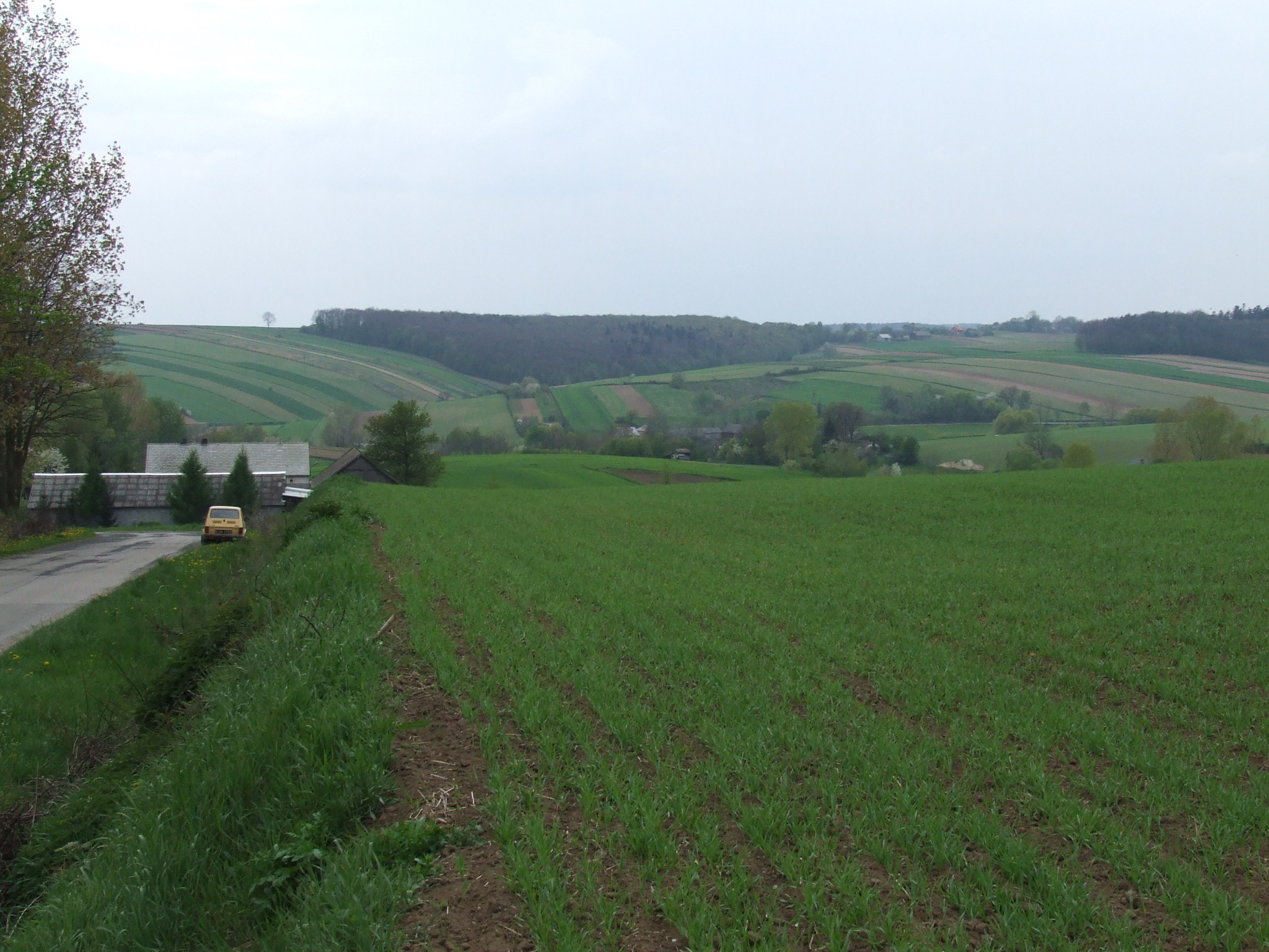 View from the side Jan Styka made a sketch of "Panorama Racławicka" picture/Widok z miejsca, z którego Jan Styka wykonał szkic do "Panoramy Racławickiej"